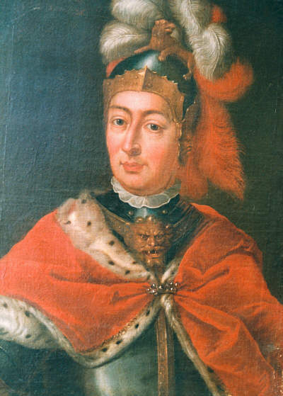 Portrait of Pfalzgraf Stefan von Simmern-Zweibrücken (1385-1459)